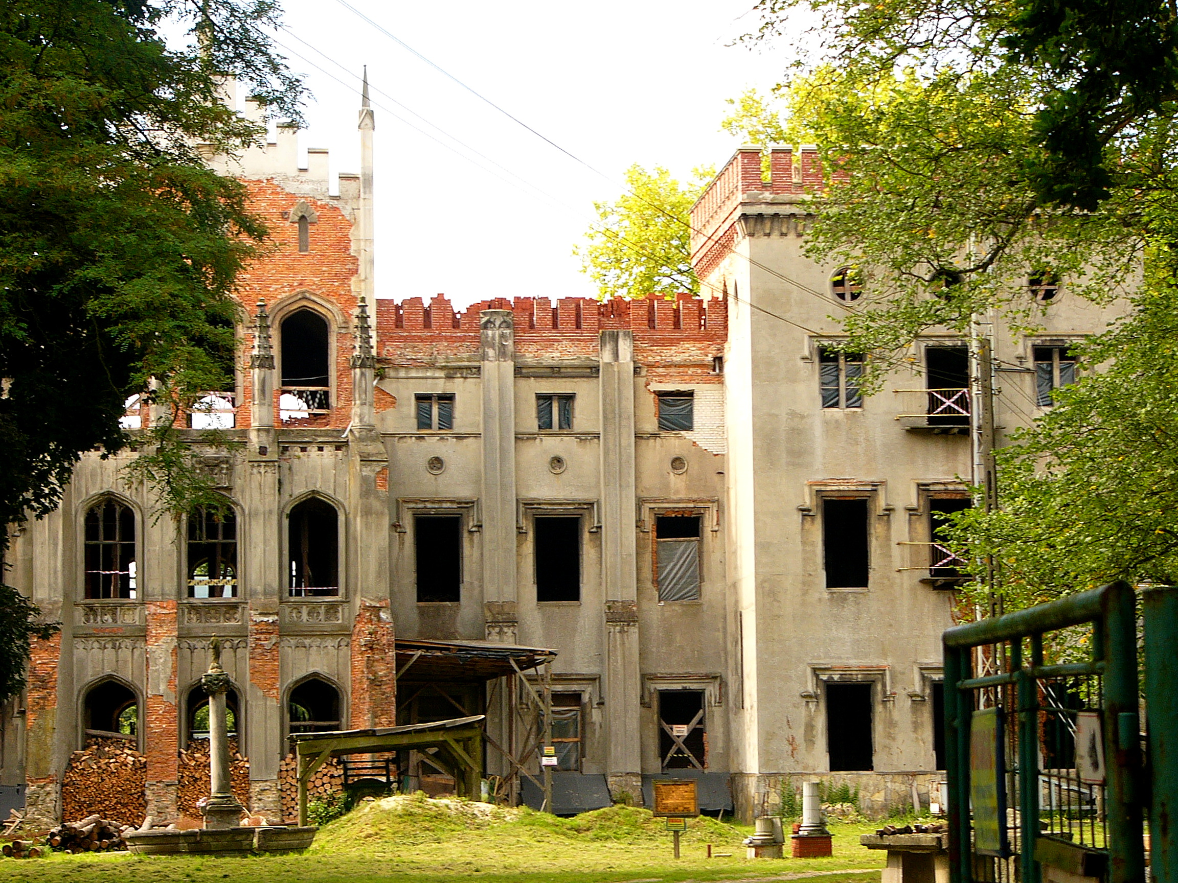 Dobra, pałac (ruina), 1720, 1857-1860